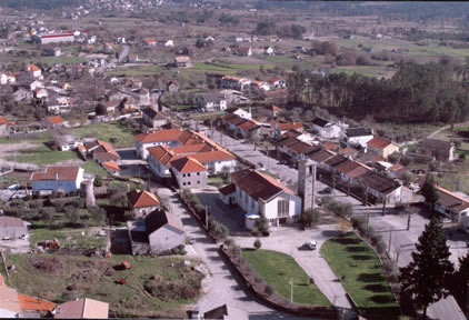 Vista aérea Avelal.